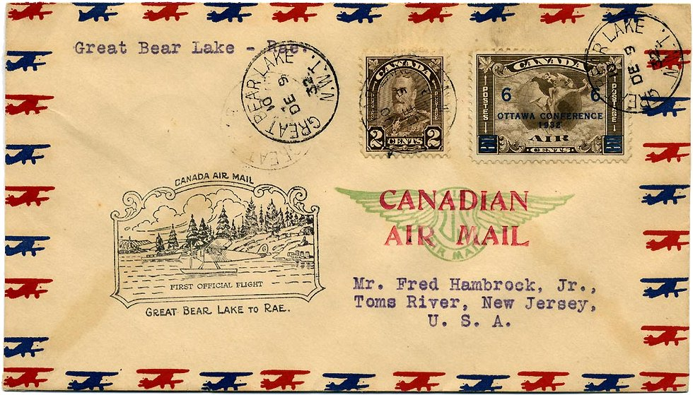 Cover Canada 1932 Rae air